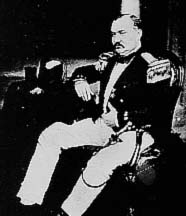 Johannes Lijdius Catharinus Pompe van Meerdervoort (1829-1908)